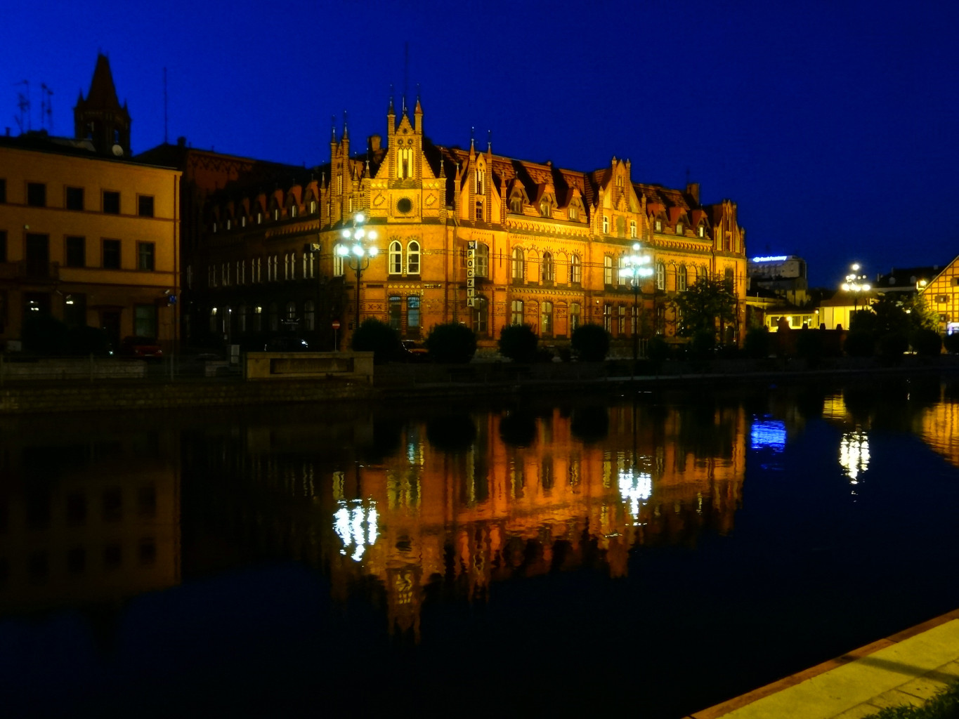 Budynek Poczty Głównej w Bydgoszczy przy ul. Jagiellońskiej (zbud. 1883 skrzydło płd, 1899 skrzydło płn)